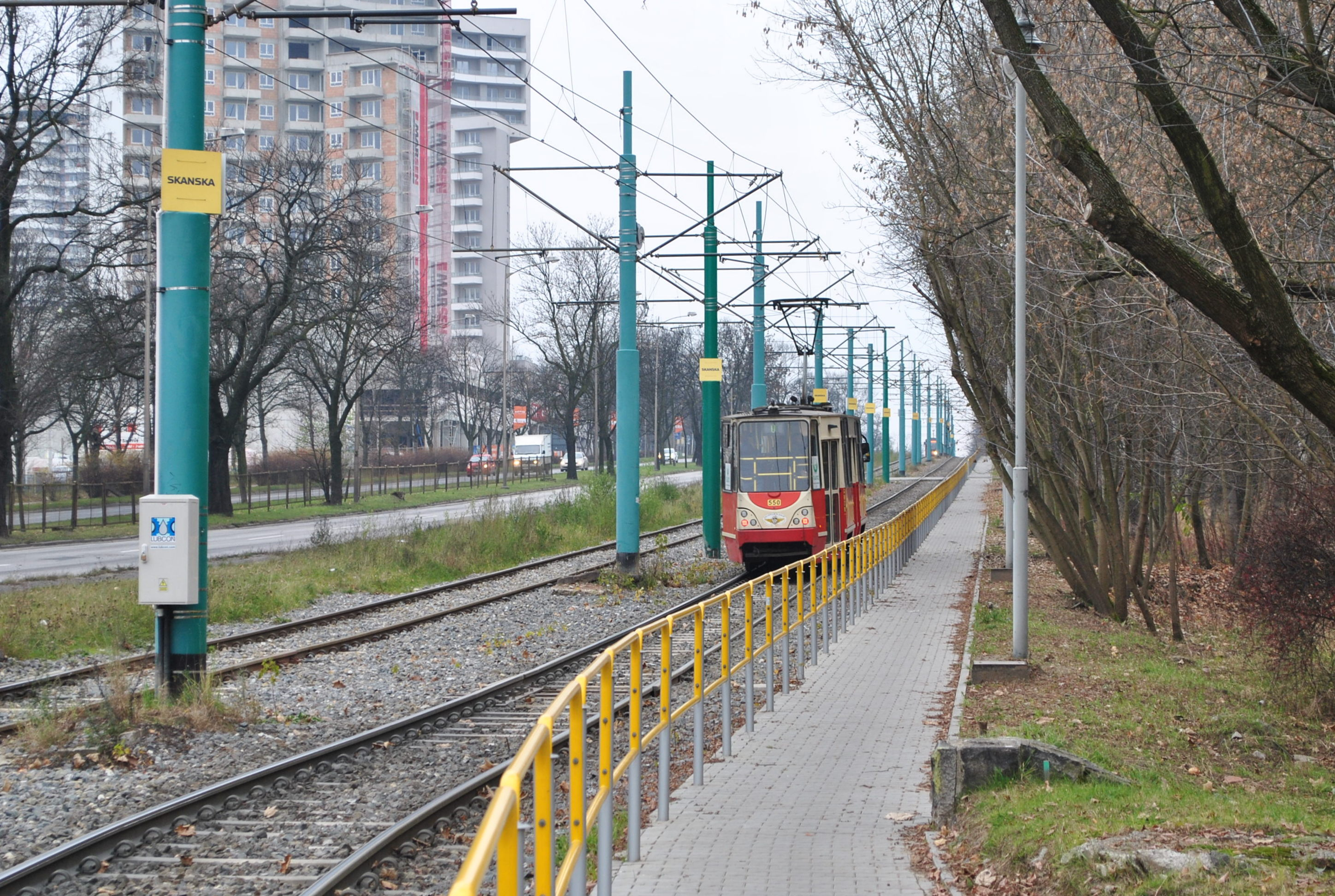 Katowice, Osiedle Tysiąclecia. Tramwaj Konstal 105Na przy ul. Chorzowskiej